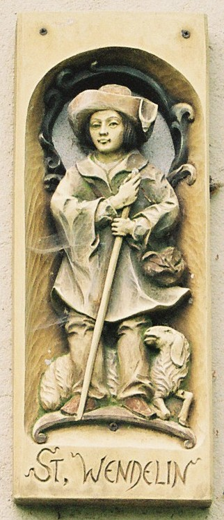 Wendelinuskapelle in Winterscheid, Heiligenfigur über dem Eingang